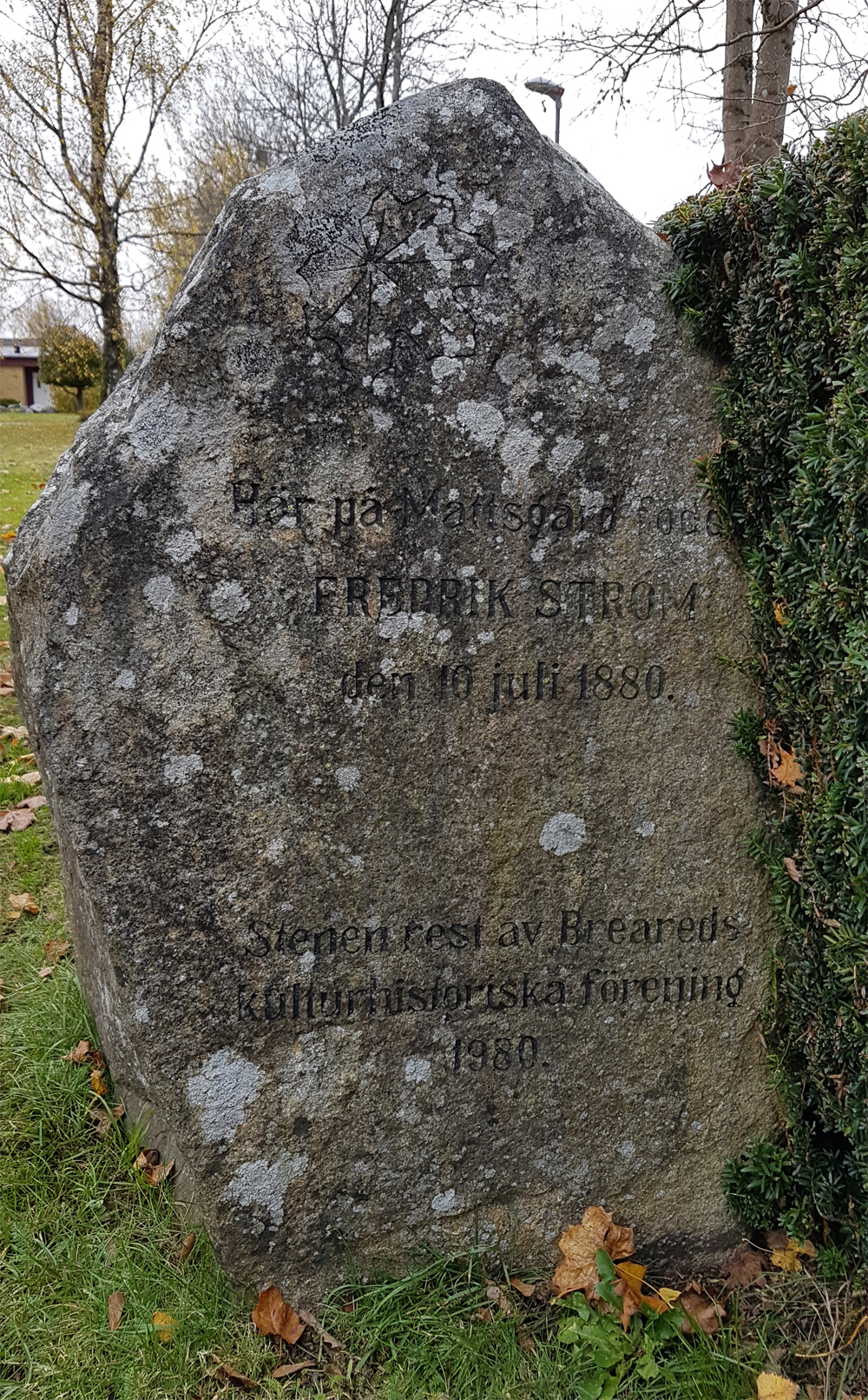 Minnessten med texten "Här på Mattsgård föddes FREDRIK STRÖM den 10 juli 1880. Stenen rest av Breareds kulturhistoriska förening 1980."